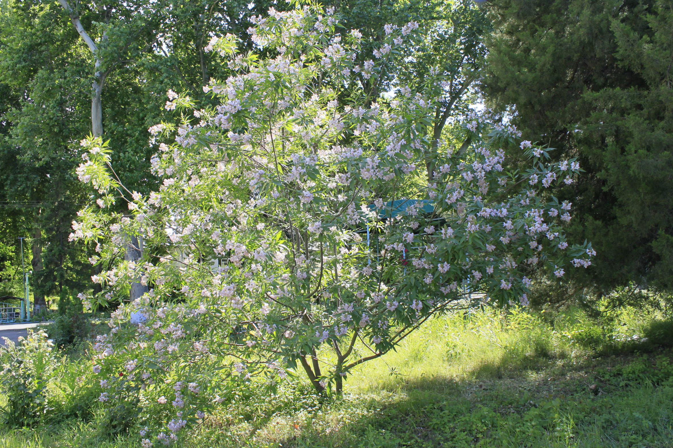 Wuchsform von Chitalpa tashkentensis